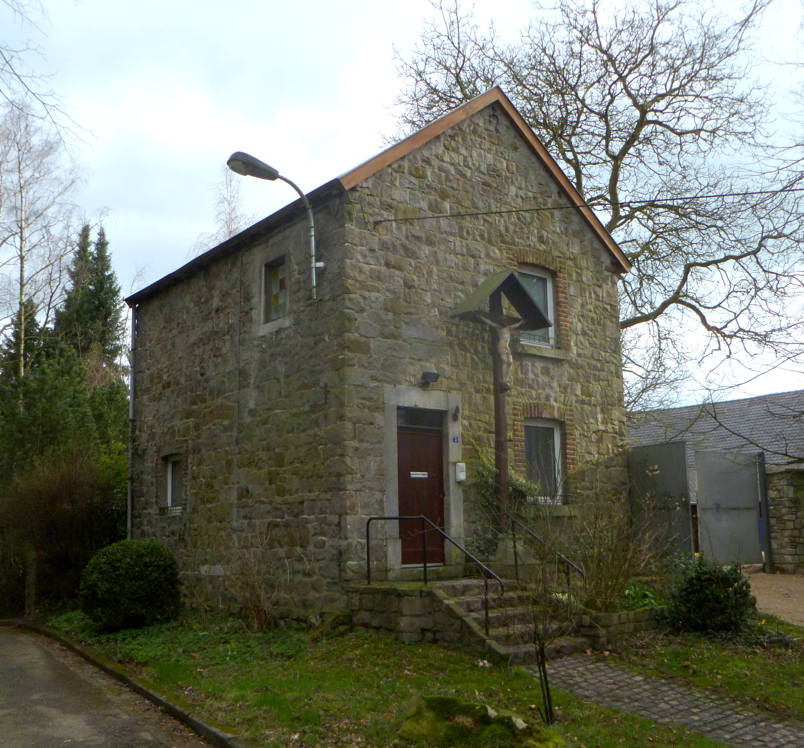 Eremitage Moresnet-Chaplle